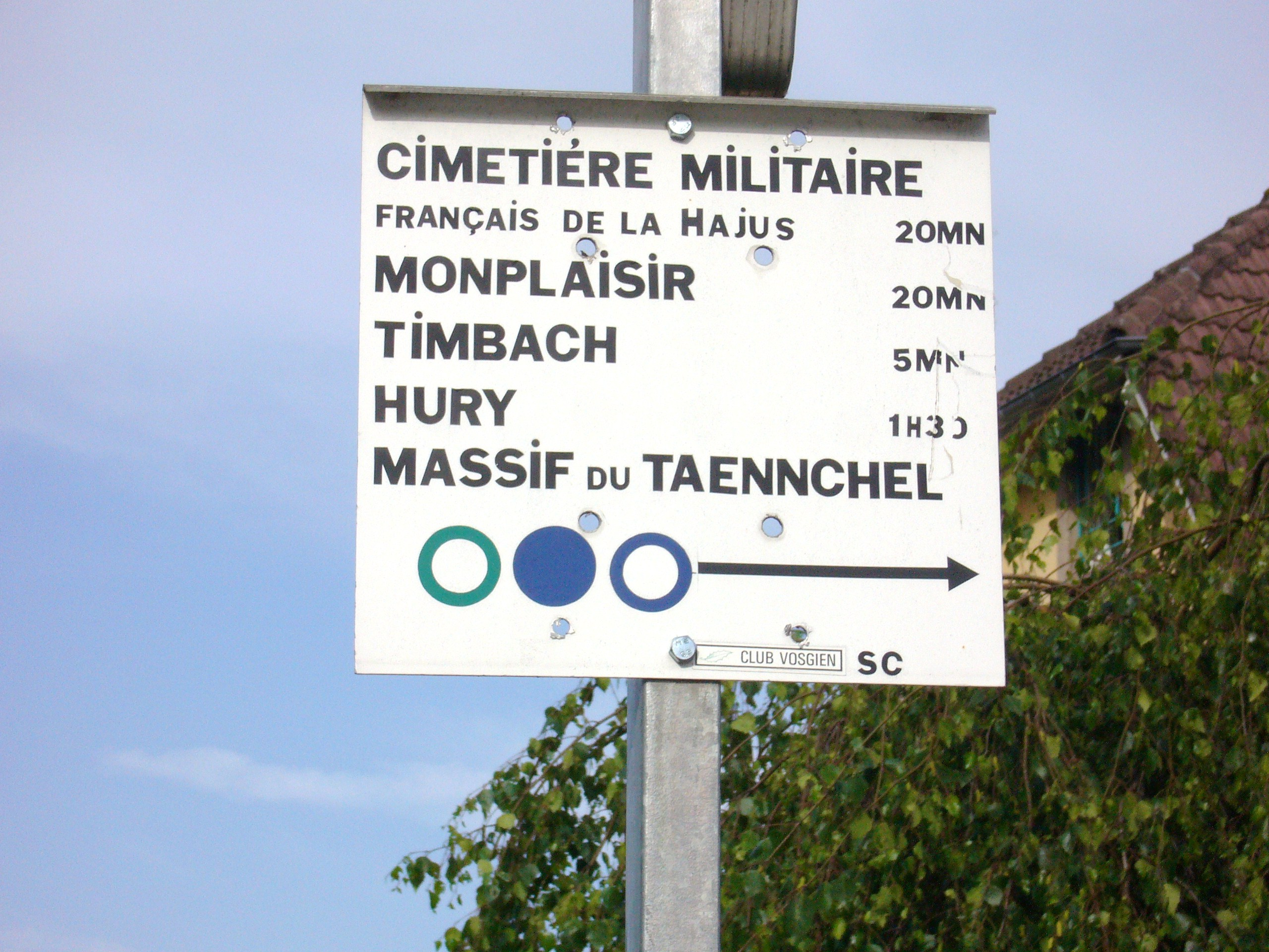 Taennchel 024.JPG